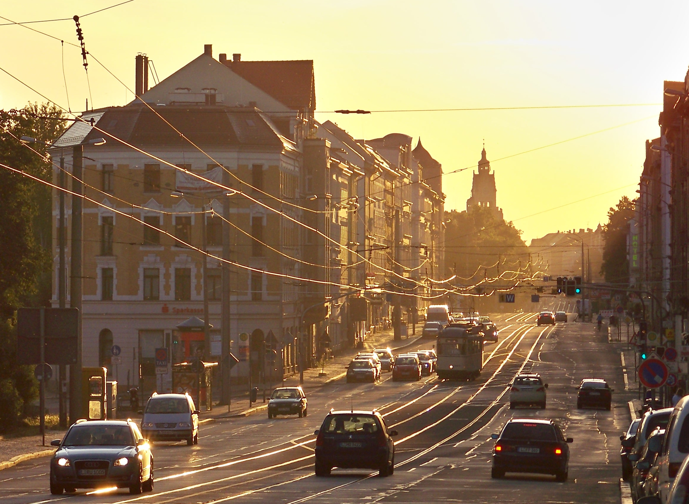 Georg-Schumann-Straße in Leipzig-Möckern mit stadtauswärtiger Blickrichtung (im Hintergrund das Rathaus Wahren) in der Abenddämmerung mit dem historischen Tw 1464 (Pullman-Wagen) der Leipziger Verkehrsbetriebe an der Ausfahrt aus Strbf. Möckern